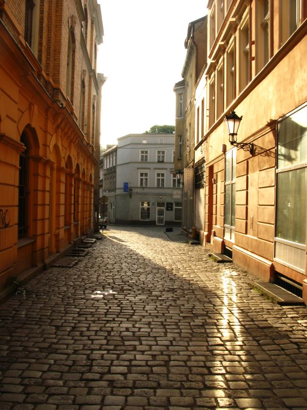 ulica Kościelna w Zielonej Górze